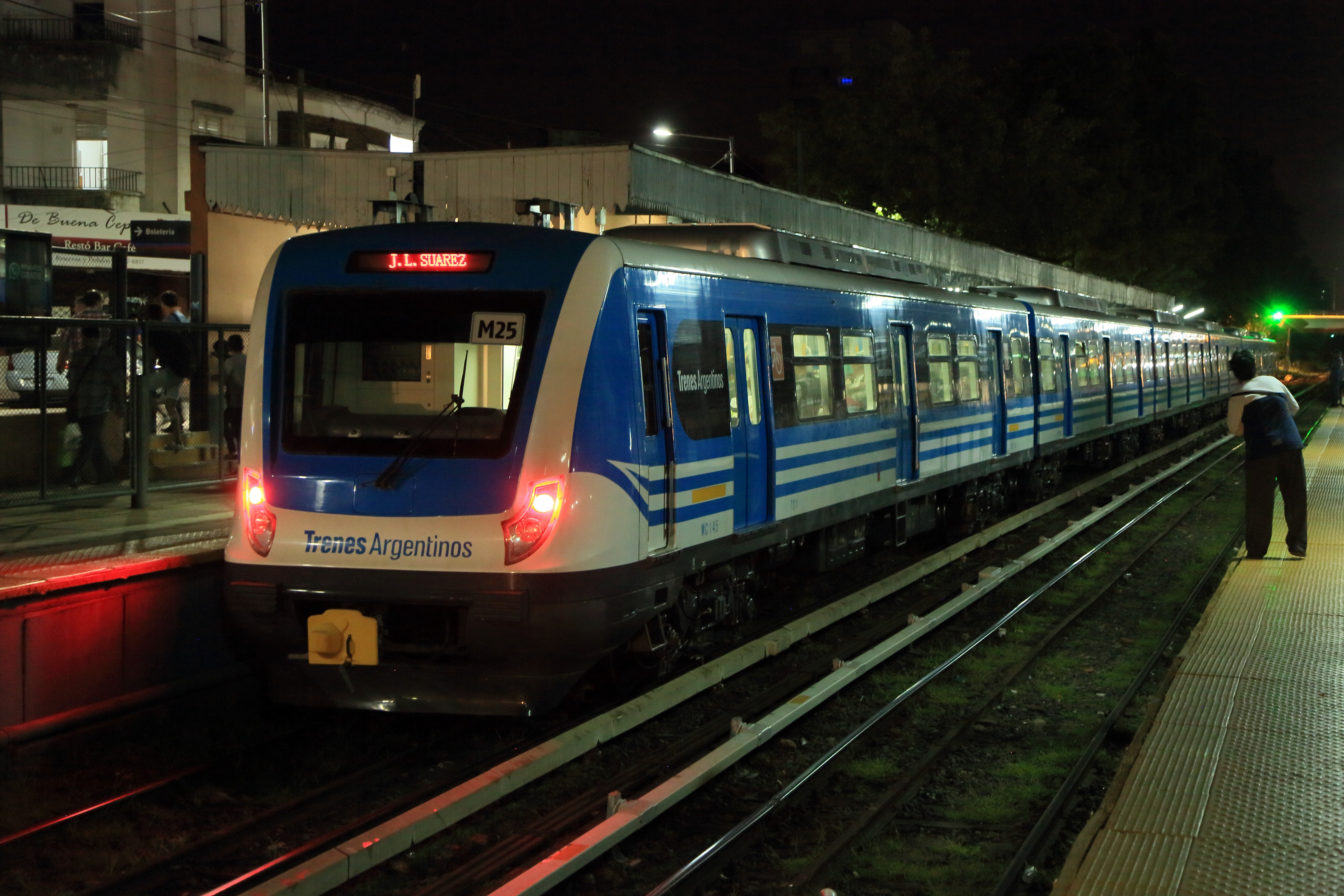 Zug nach José León Suárez, Nachschuss. Entgegen der Darstellung auf den Streckennetzplänen zweigt die Strecke nach Zárate nicht hier ab, die Züge benutzen vielmehr bis José León Suárez dieselben Gleise. Hier in Villa Ballester sind die Voraussetzungen für das Kehren der lokbespannten Züge von und nach Zárate deutlich besser, zumal die unterschiedlichen Bahnsteighöhen die gemeinsame Benutzung ausschließt.